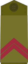 Serbian military ranks and insignia